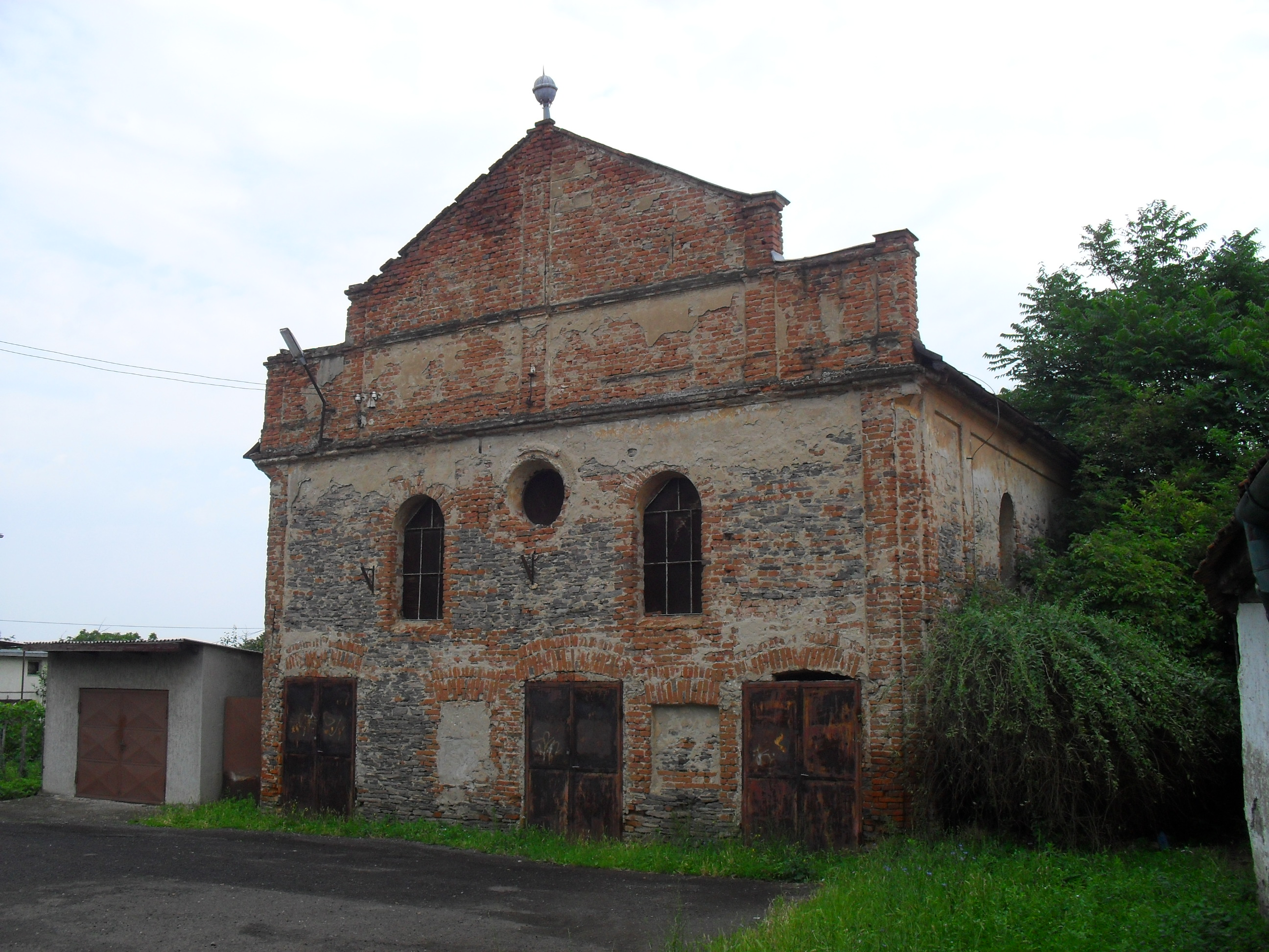 Királyhelmec - zsinagóga